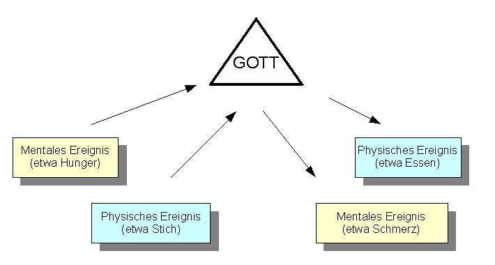 Okkasionaismus